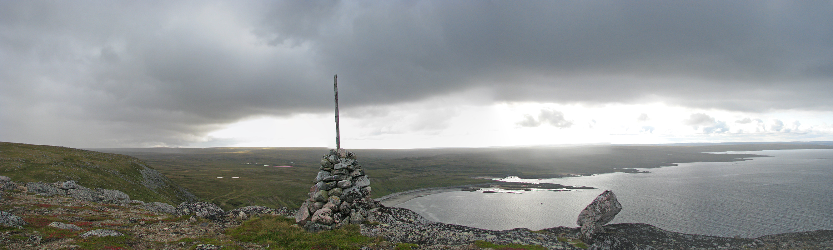 Вид со Святого Носа